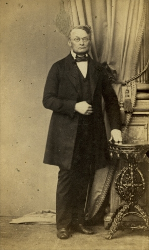 Guido Samson von Himmelstiern, baltisaksa arstiteadlane